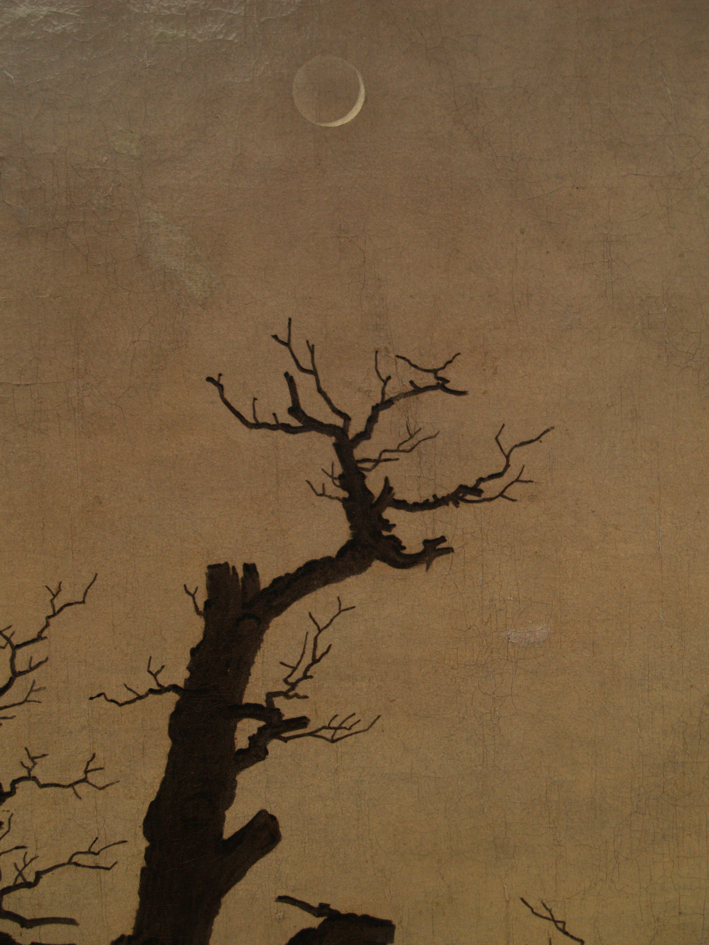 Ruinas de una abadía. Caspar David Friedrich. Berlín, Alte Nationalgalerie.